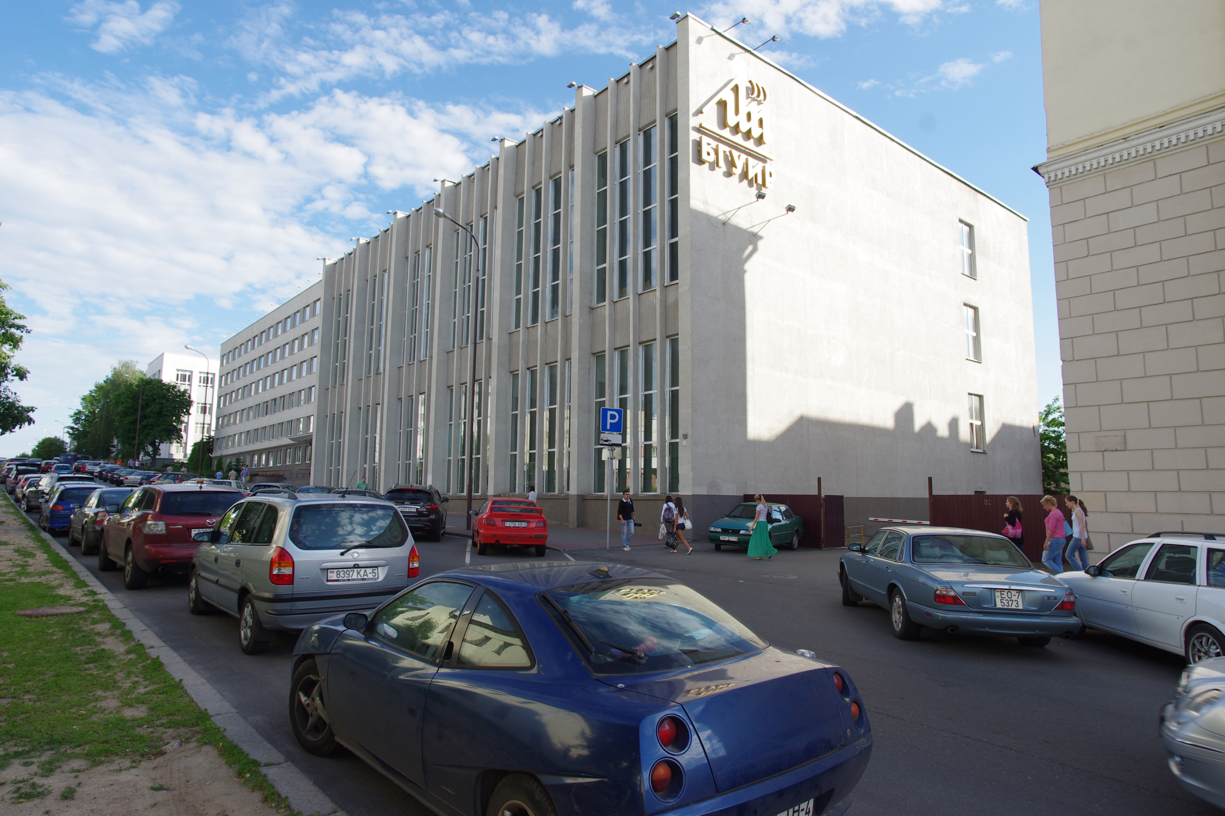 БДУІР